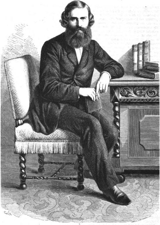 Albrecht von Graefe, Professor der Augenheilkunde in Berlin im 19. Jh., Begründer der Ophtalmologie in Deutschland.